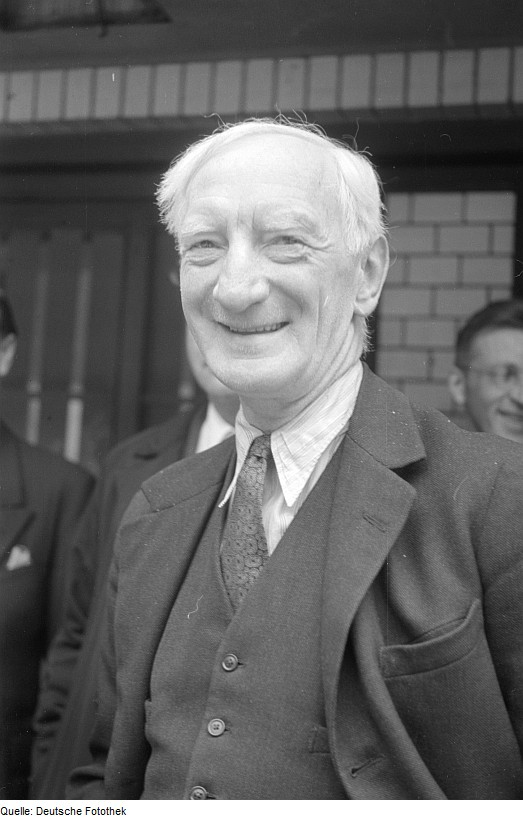 Original image description from the Deutsche Fotothek Dr. [Arno ?] SchellenbergWilliam Beveridge